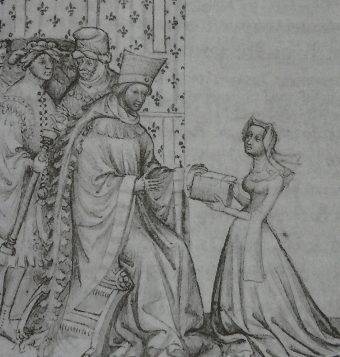 Christina Pisánská předává svou knihu Ludvíkovi Orleánskému